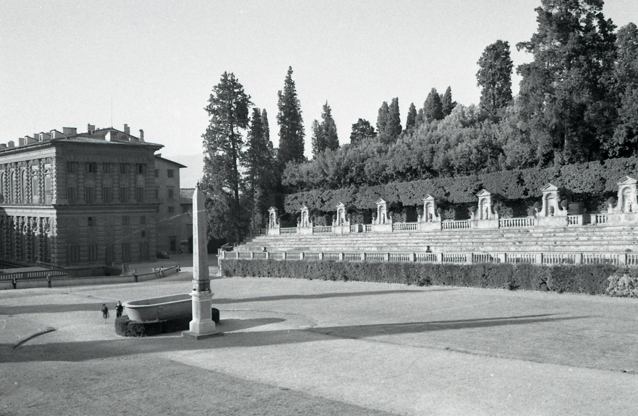 Servizio fotografico : Firenze, 1965 / Paolo Monti. - Strisce: 6, Fotogrammi complessivi: 29 : Negativo b/n, gelatina bromuro d'argento/ pellicola ; 35 mm. - ((I fotogrammi hanno una doppia numerazione. - Sul portanegativi: Leica Plus X. - Occasione: Pubblicazione: "Emilio CECCHI, Natalino SAPEGNO (a cura di), Storia della Letteratura Italiana, 9 voll., Milano, Garzanti, 1966 e segg."